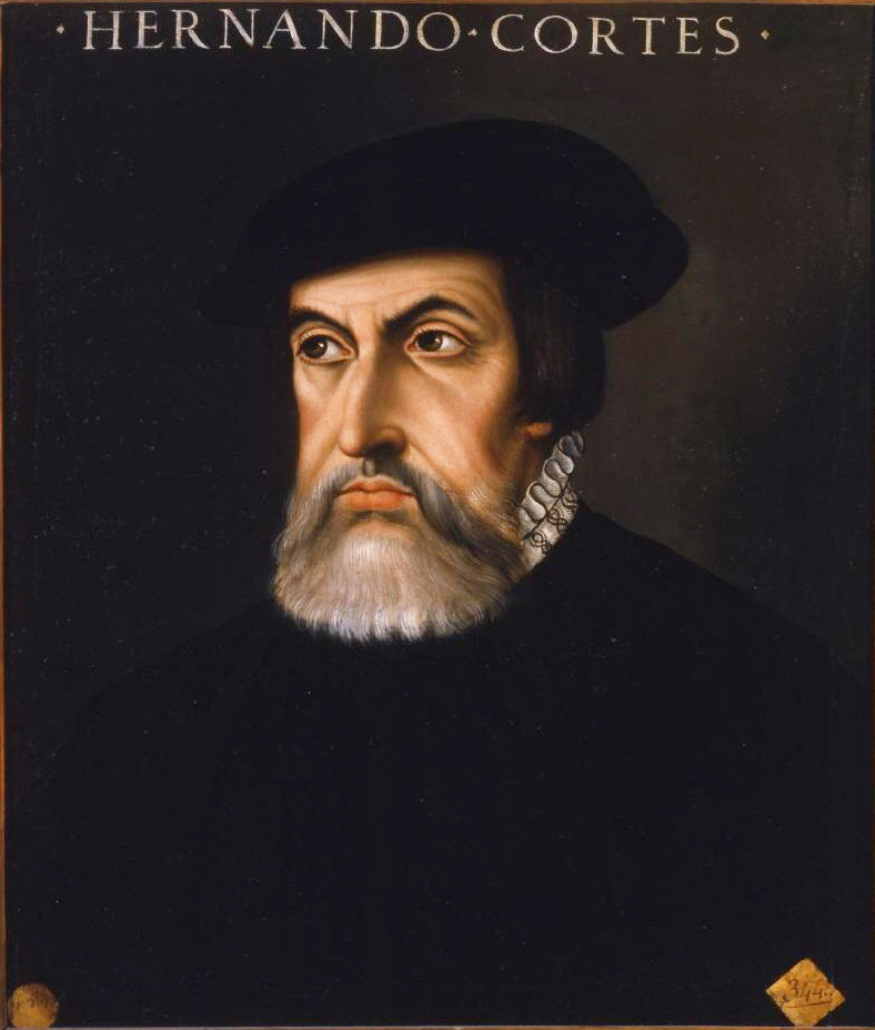 Esta obra es un retrato anónimo del célebre conquistador español Hernán Cortés (1485-1547), basado en el cuadro enviado por el propio retratado a Paulo Giovio, en el que aparecía de perfil y con sombrero, sirviendo dicha obra de modelo para muchas representaciones de su busto desde el siglo XVI en adelante.